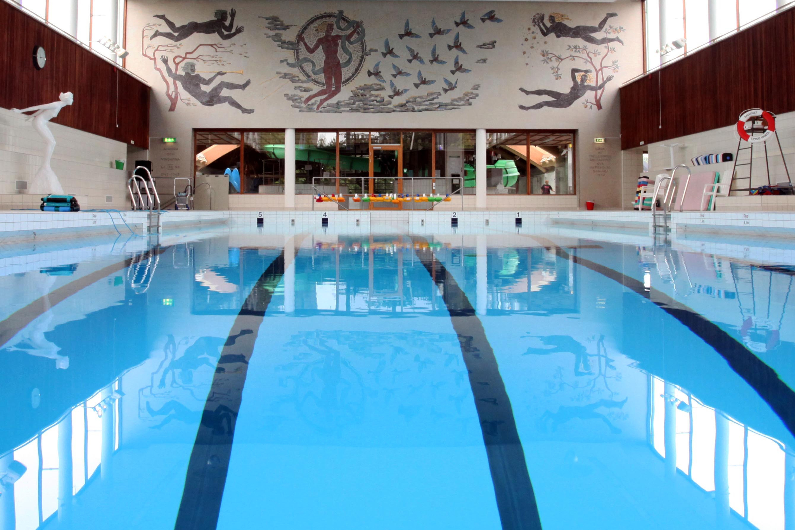 Gamla 25-meters bassängen. Arkitekt Erik Fehling. Byggår 1939. I fonden mosaiken Aurora och Vindarna av Hugo Gehlin efter donation av skeppsredare Jarl Malmros. Invigd 1943